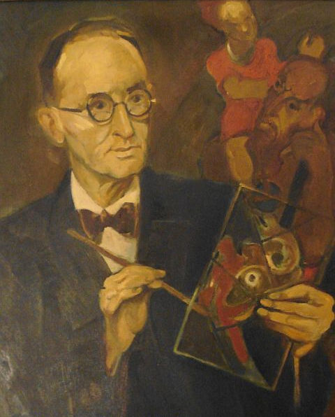 Portret van Gerard Mesterom (1939) door Henri Jonas